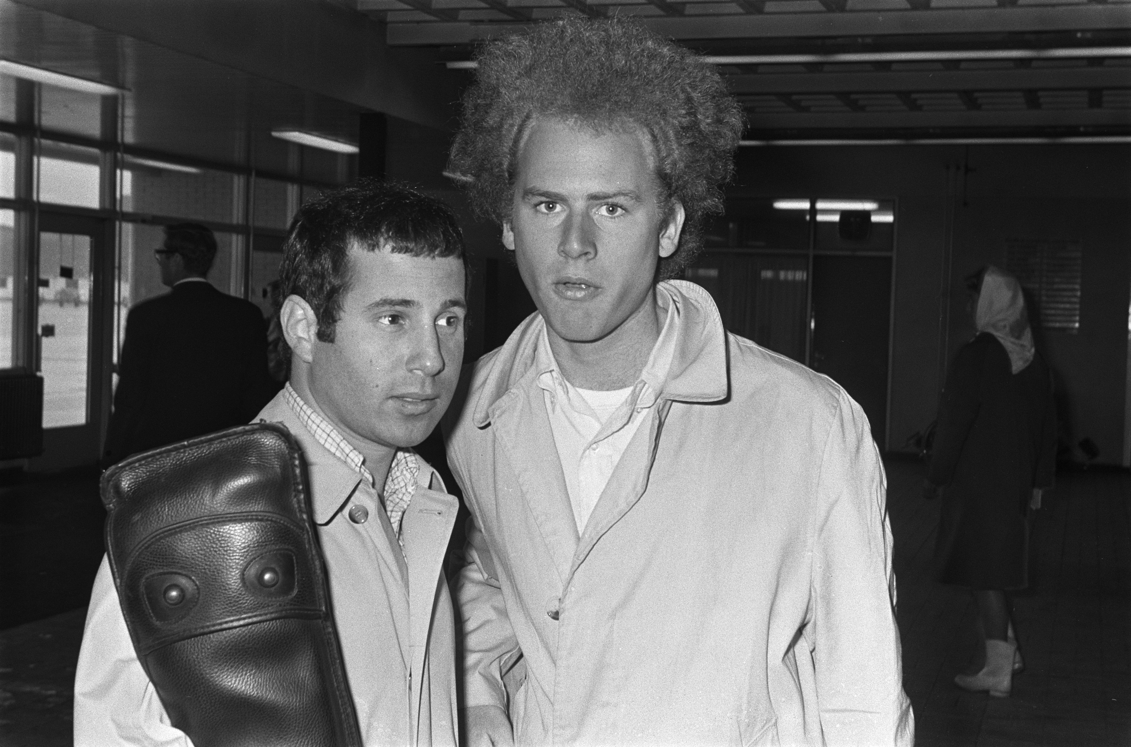 Collectie / Archief : Fotocollectie Anefo Reportage / Serie : [ onbekend ] Beschrijving : Aankomst Paul Simon (links) en Art Garfunkel op Schiphol Datum : 28 juni 1966 Locatie : Noord-Holland, Schiphol Trefwoorden : musici, popgroepen, vliegvelden, zangers Persoonsnaam : Garfunkel, Art, Simon, Paul Fotograaf : Evers, Joost / Anefo Auteursrechthebbende : Nationaal Archief Materiaalsoort : Negatief (zwart/wit) Nummer archiefinventaris : bekijk toegang 2.24.01.05 Bestanddeelnummer : 919-3035